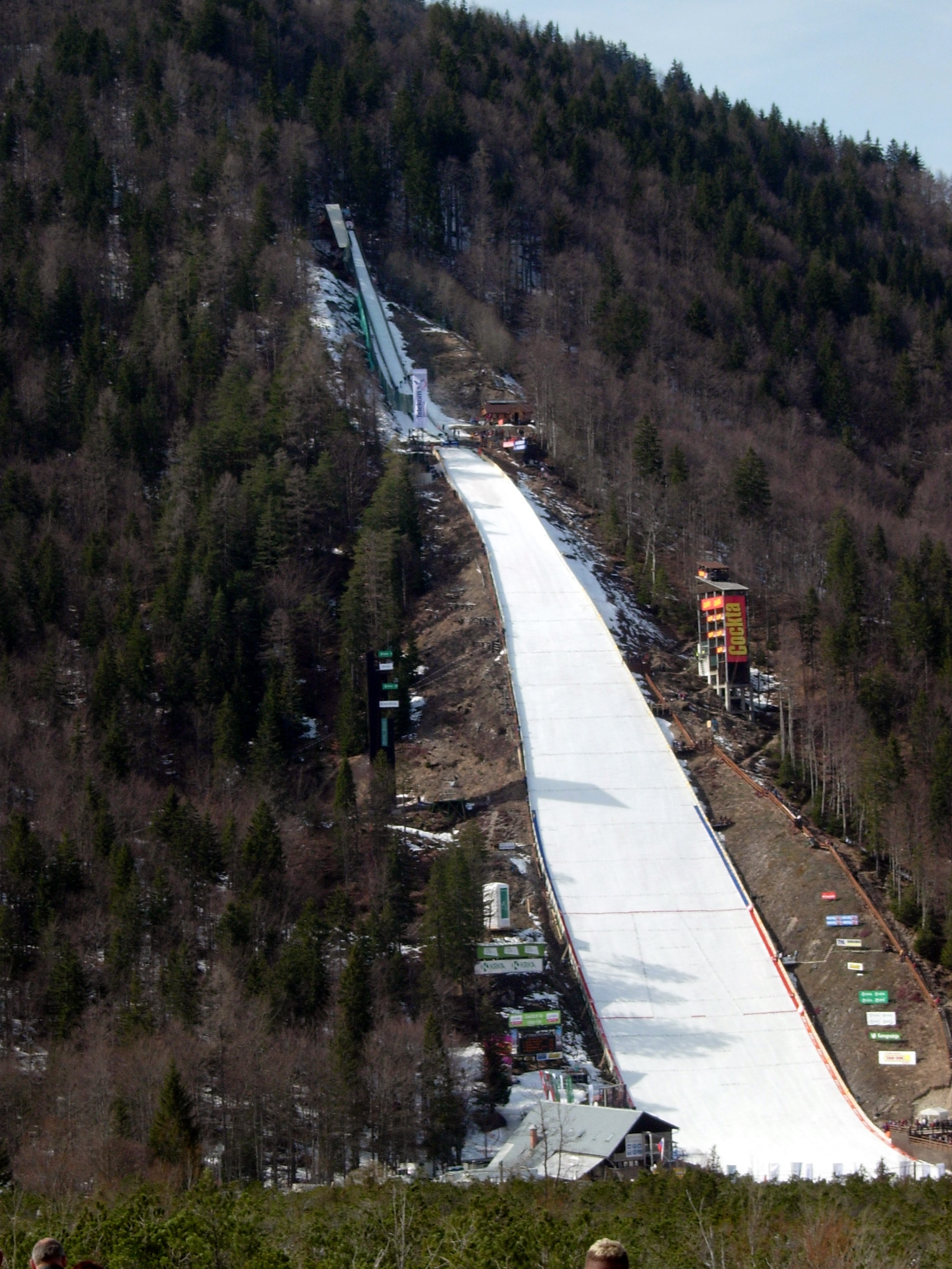 Letalnica in Planica, Ratece, Kranjska Gora